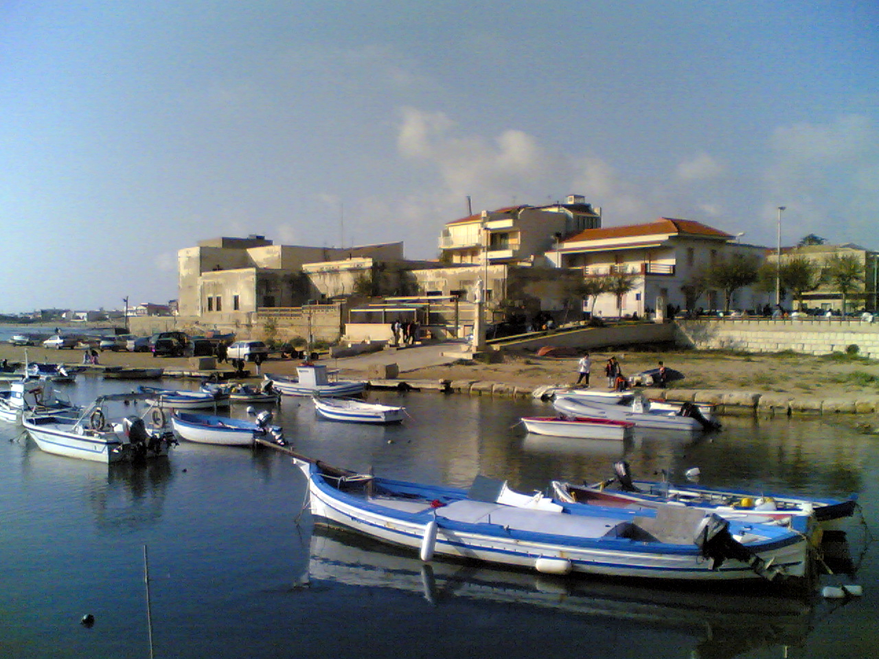 Il porticciolo di Punta Secca